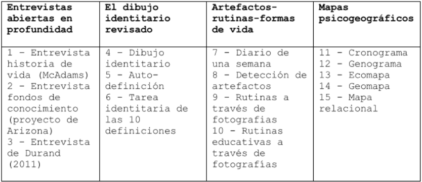 En aquesta taula es descriuen les diferent tecniques que es poden utilitzar en la Multi-metodología Autobiográfica Extendida (MAE)